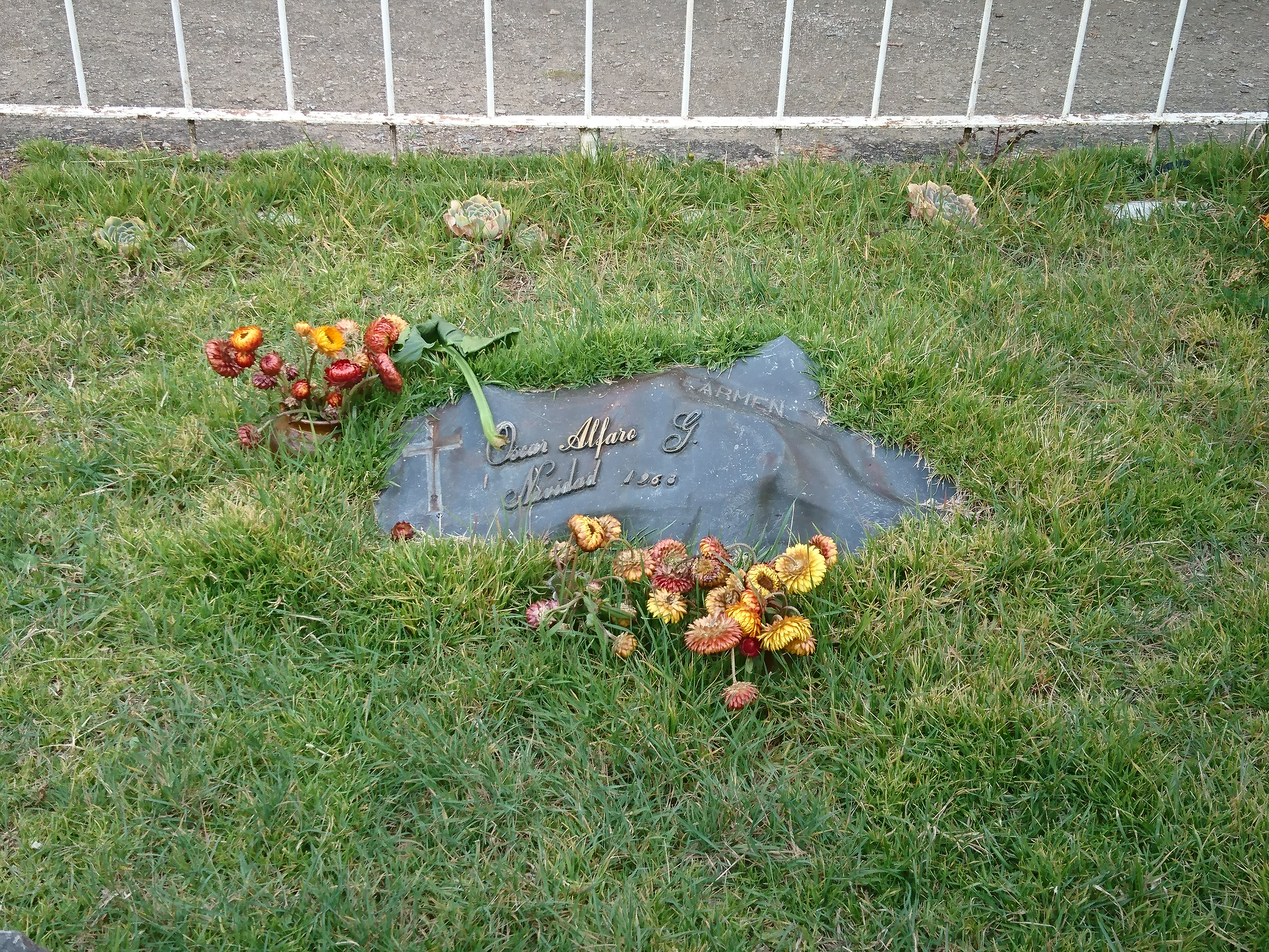 Tumba de Oscar Alfaro en el Cementerio general de La Paz